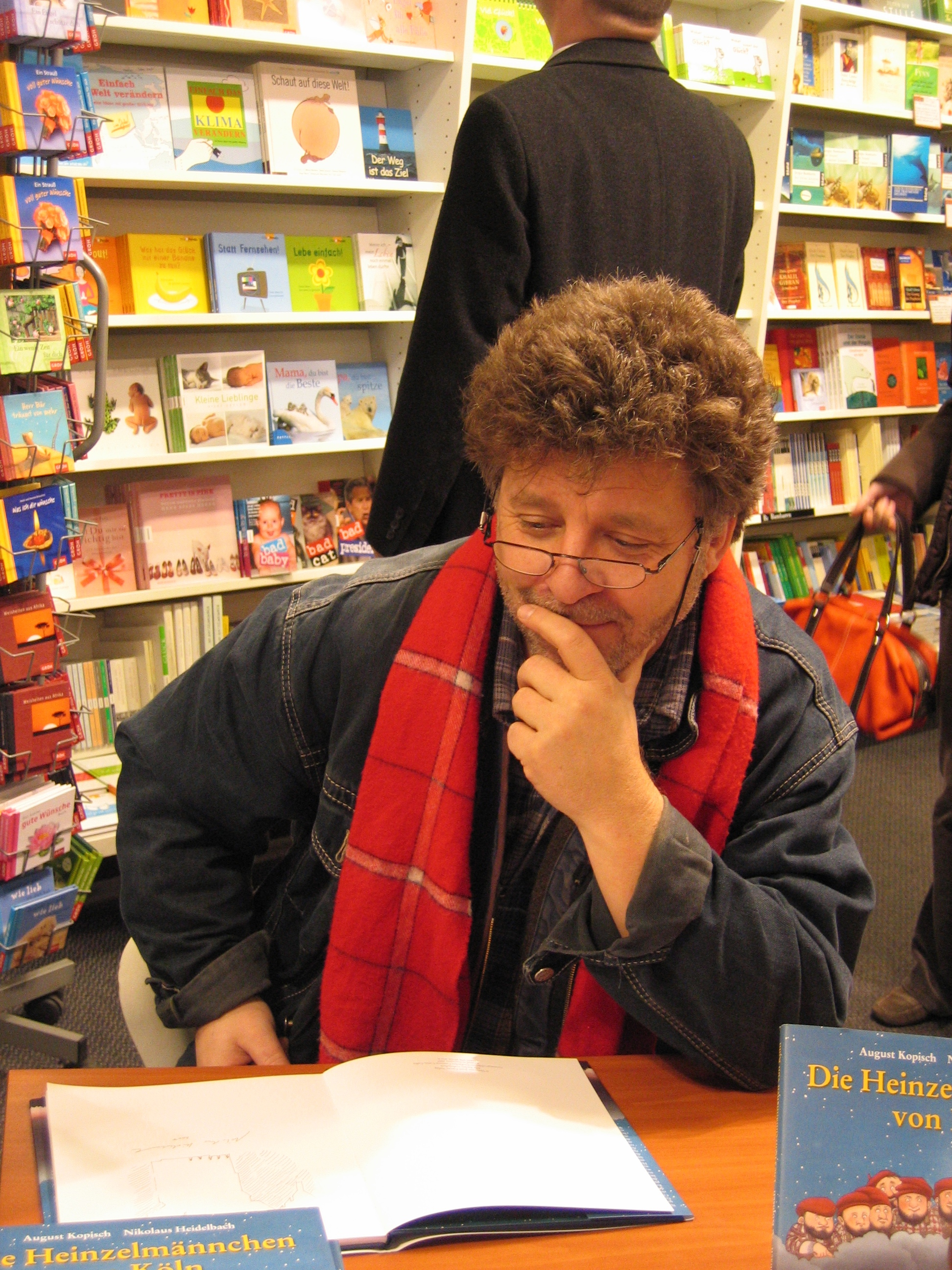 Nikolaus Heidelbach signiert seine Bücher in Köln. Dezember 2007